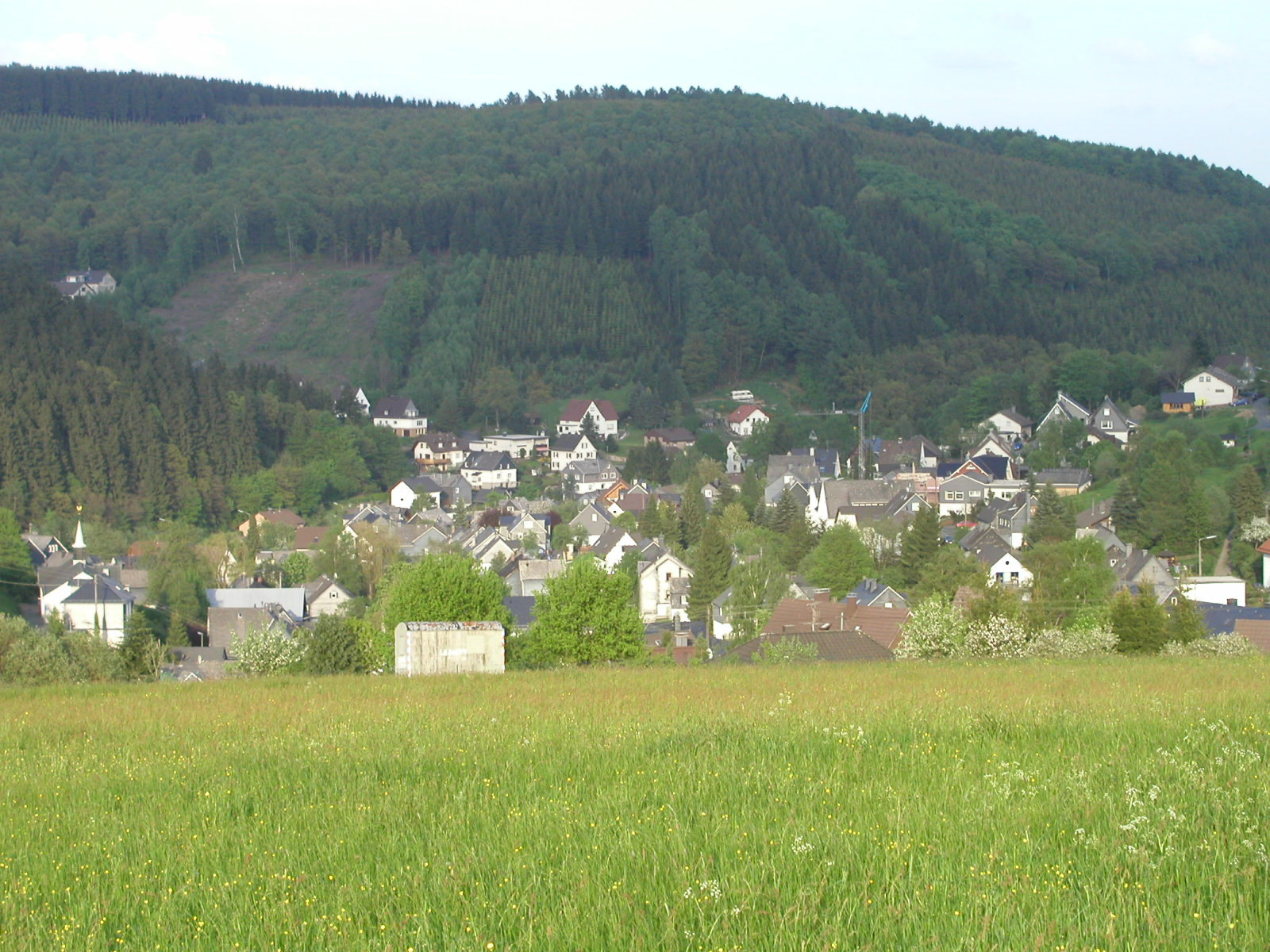 Fotografie von Oberschelden (Stadtteil von der Stadt Siegen)